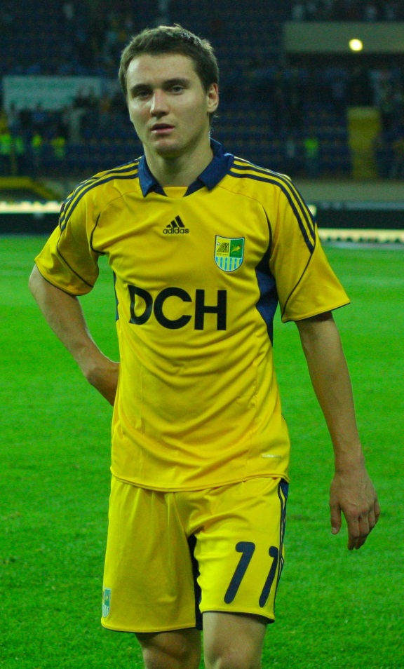 Денис Олейник